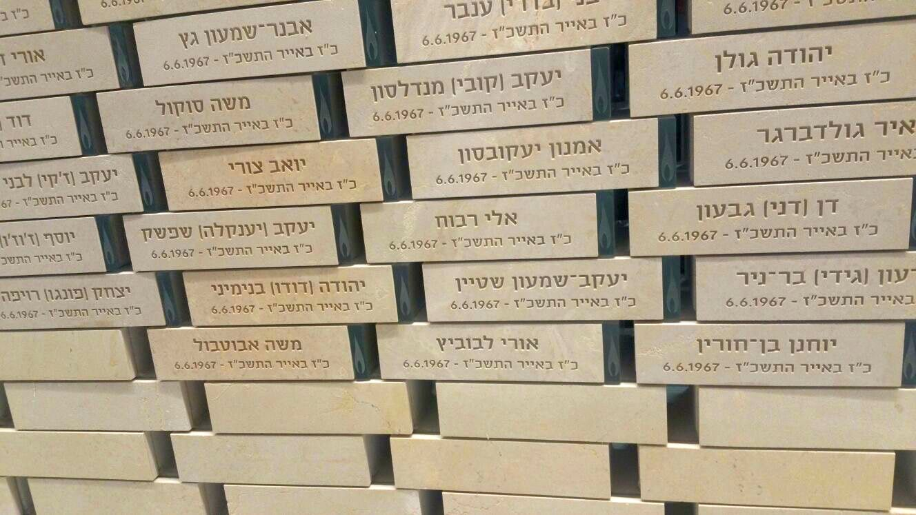 קטע מקיר הנצחה בהיכל הזיכרון הממלכתי לחללי מערכות ישראל ממלחמת ששת הימים, חיילים שנפלו ב- 6 ביוני 1967 עם שמו של אורי לבוביץ חובש קרבי שנפל בגבעת התחמושת וקיבל אות מופת